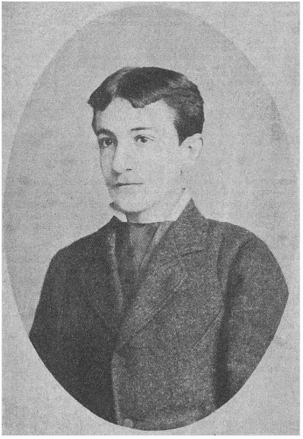 1875 - Take Ionescu, România, la terminarea liceului (17 ani)